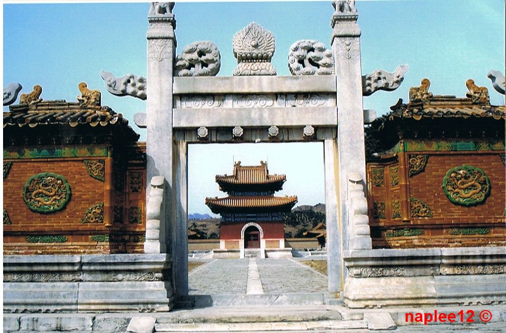 Muling